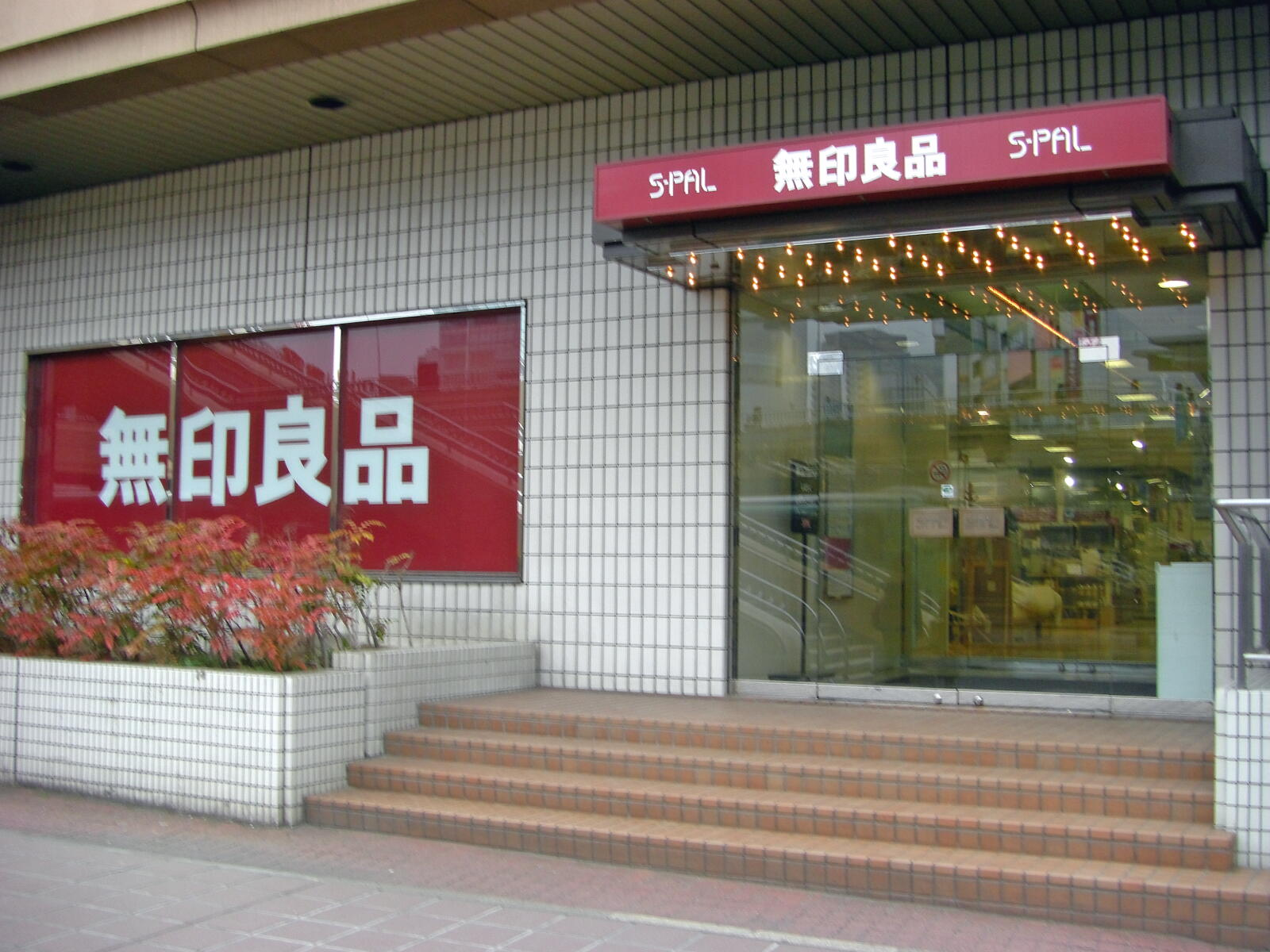 無印良品エスパル仙台店